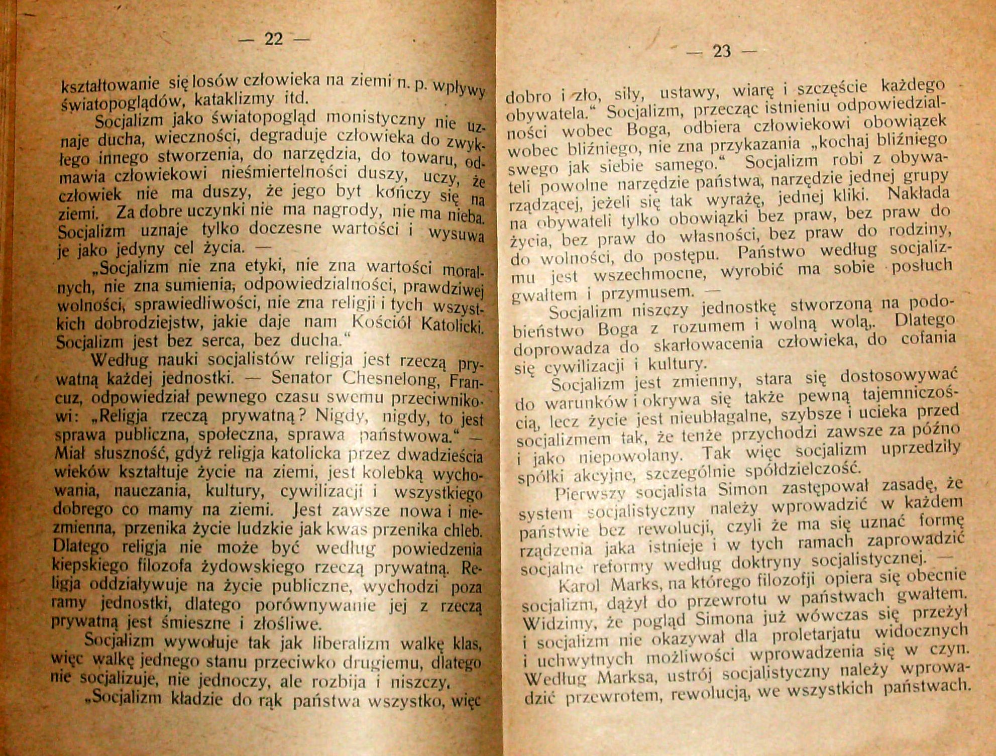 Stanisław Krzyżowski, Rozmyślania w czterdziestą rocznicę encykliki „Rerum novarum”, wydanej 15 maja 1891 r. przez papieża Leona XIII, Pszczyna 1931